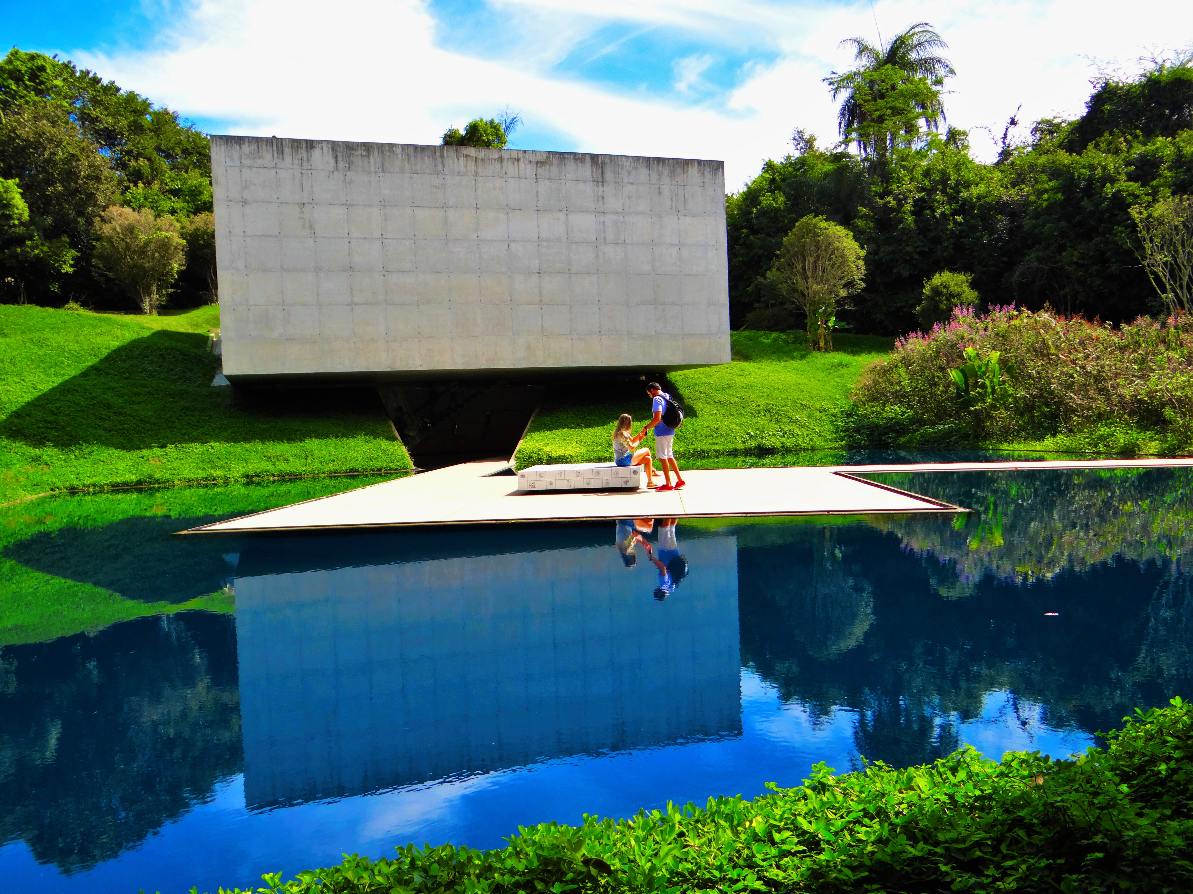 Foto tirada em frente à Galeria Adriana Varejão, Centro de Arte Contemporânea Inhotim